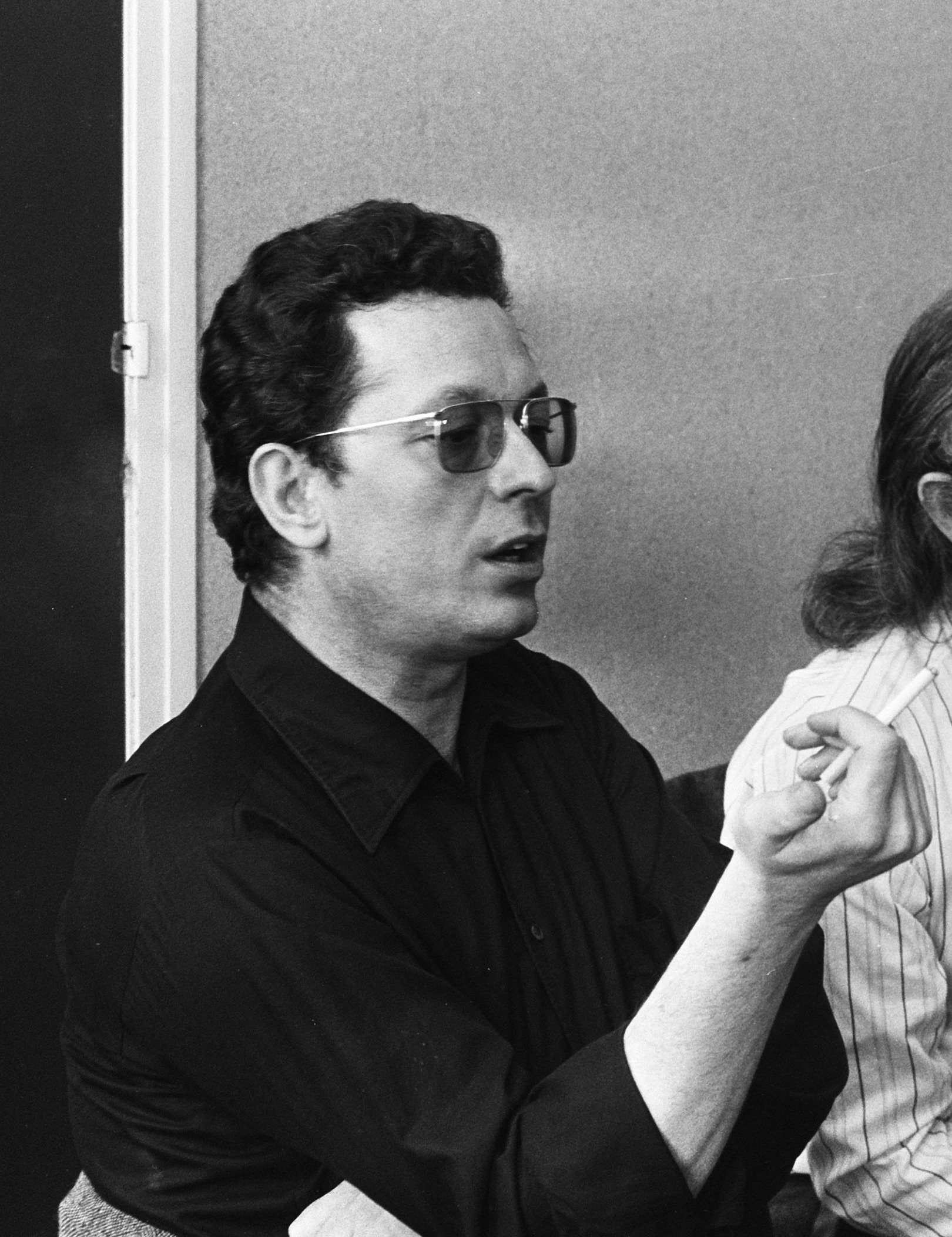 Persconferentie van de Nederlandse Operastichting in Carré te Amsterdam. Regisseur Götz Friedrich (links) en Hans de Roo, directeur van de Nederlandse Operastichting